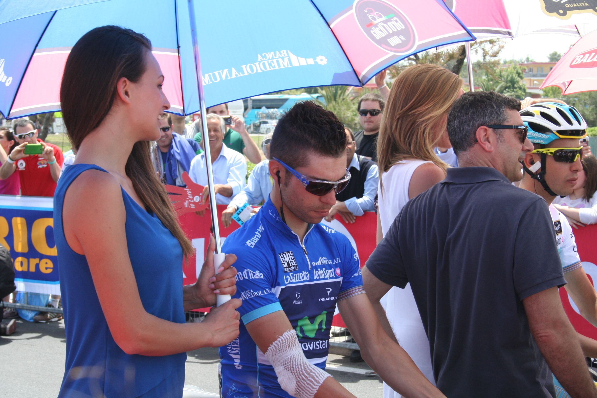 immagini dalla partenza della 7a tappa Giro 2013 (San Salvo Marina)